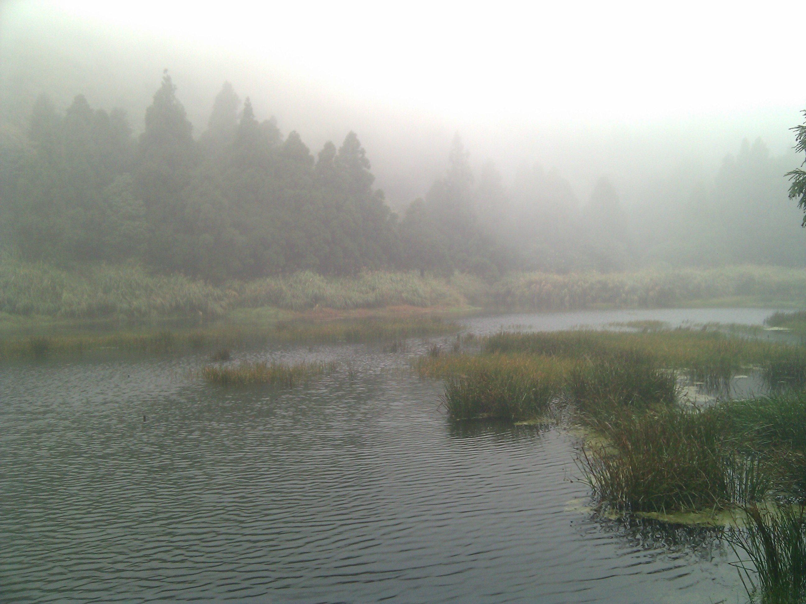 中文（台灣）: 陽明山夢幻湖。